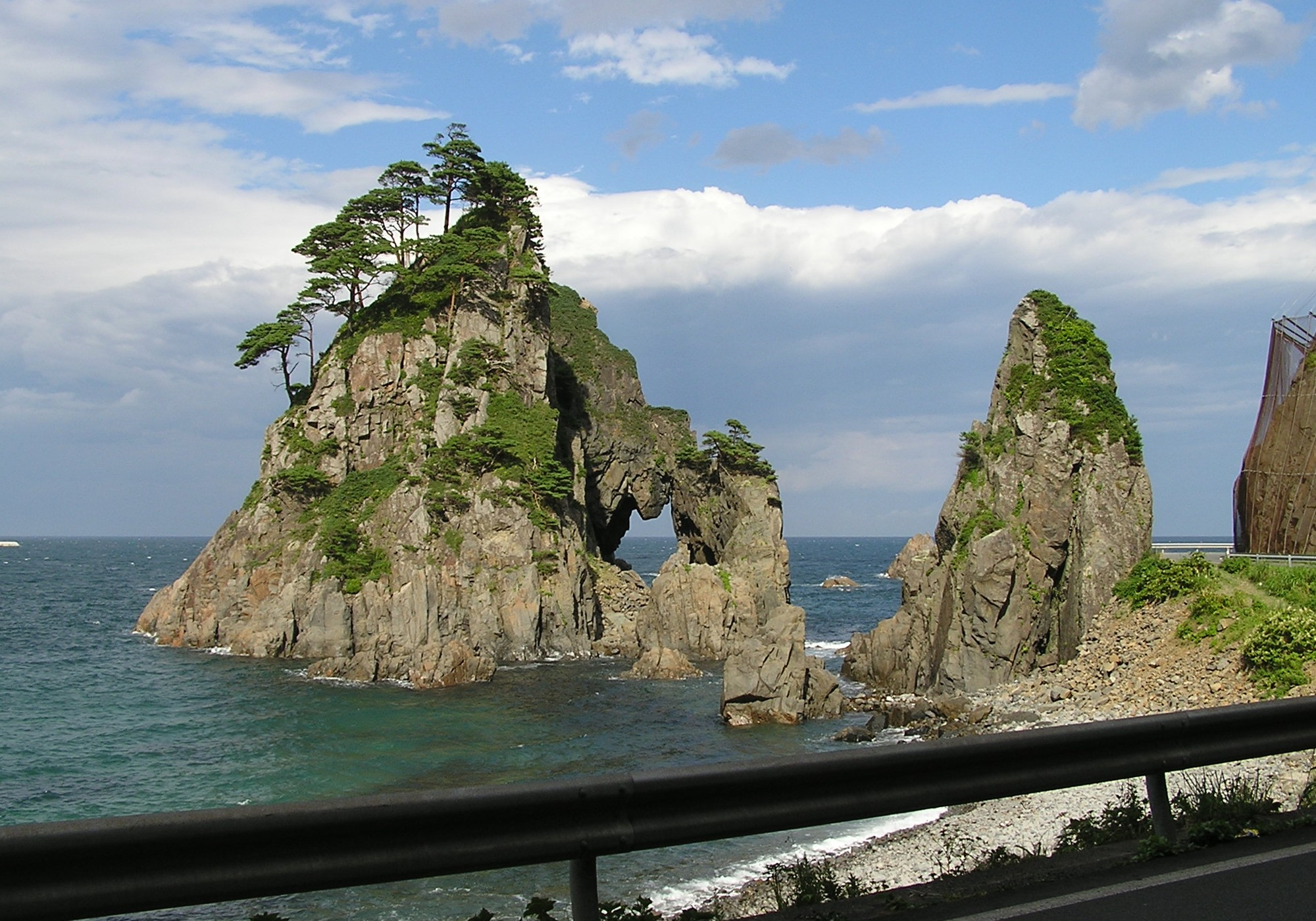 岩手県道268号野田長内線より望むつりがね洞